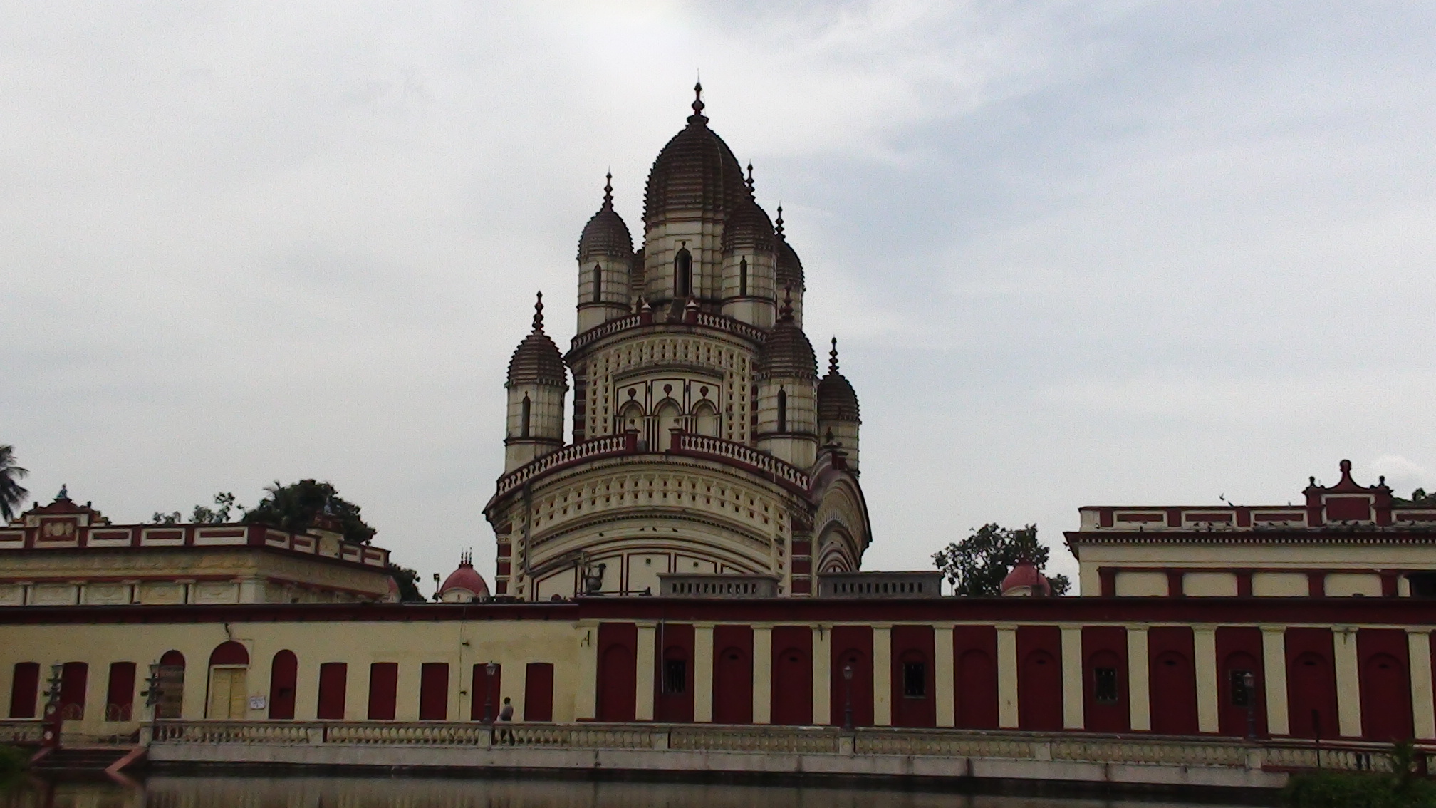 கொல்கத்தாவில் இருந்து அருள்பாலிக்கும் ஸ்ரீஇராமகிருஷ்ணர் வழிபட்ட காளிகோயில்.